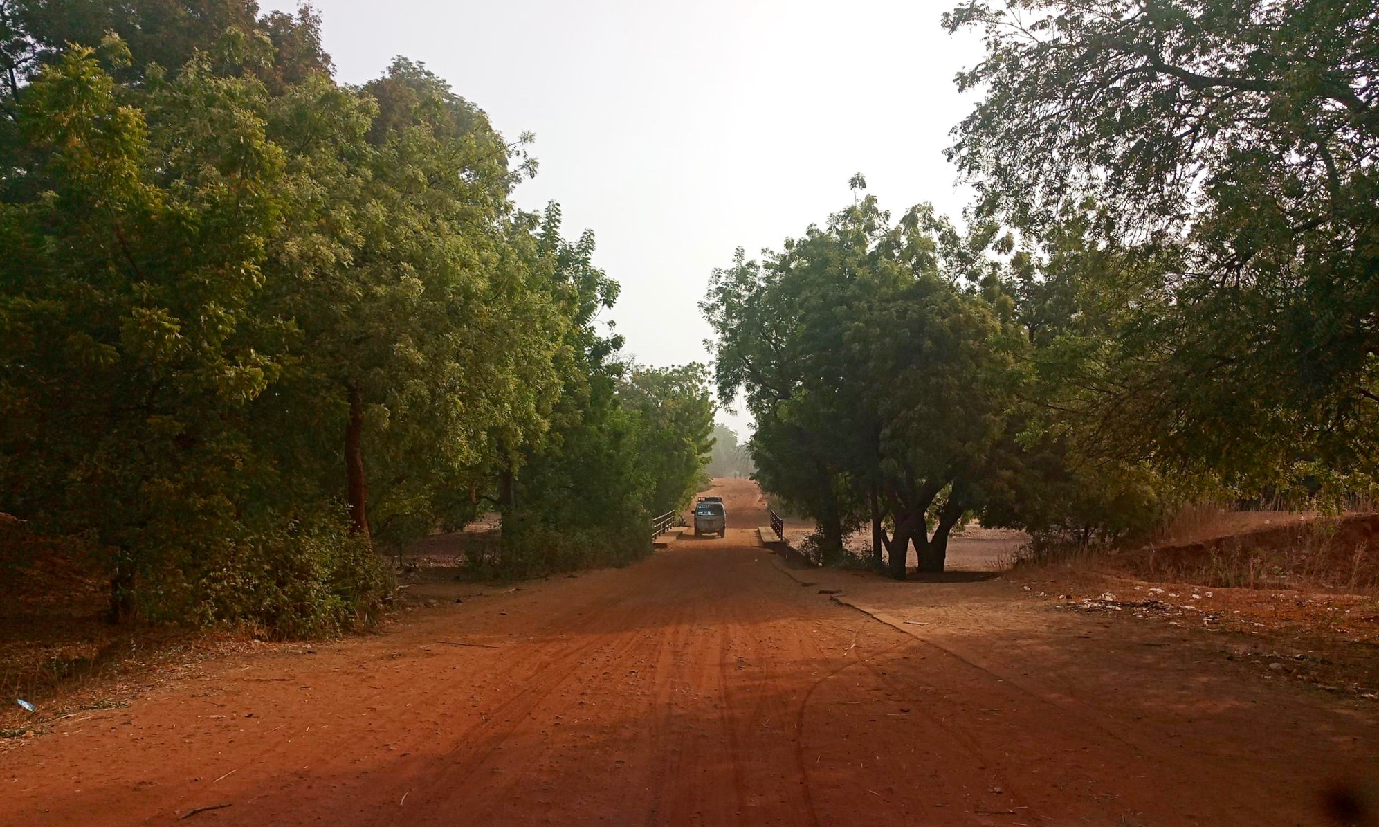 Nationalstraße 27 im Tamou-Wildreservat, Gemeinde Tamou, Niger.